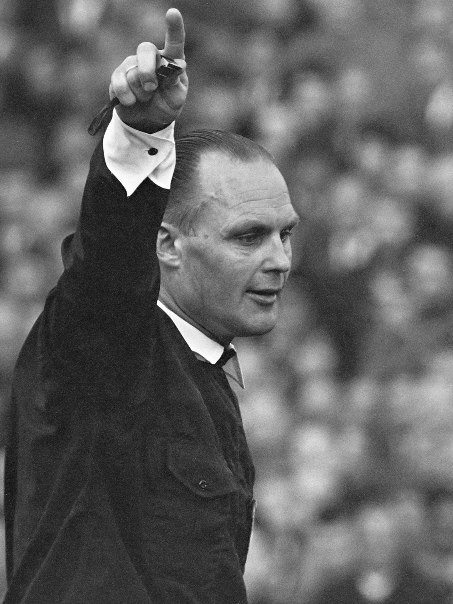 ADO tegen Ajax 1-0. Scheidsrechter Ravens 3 december 1967